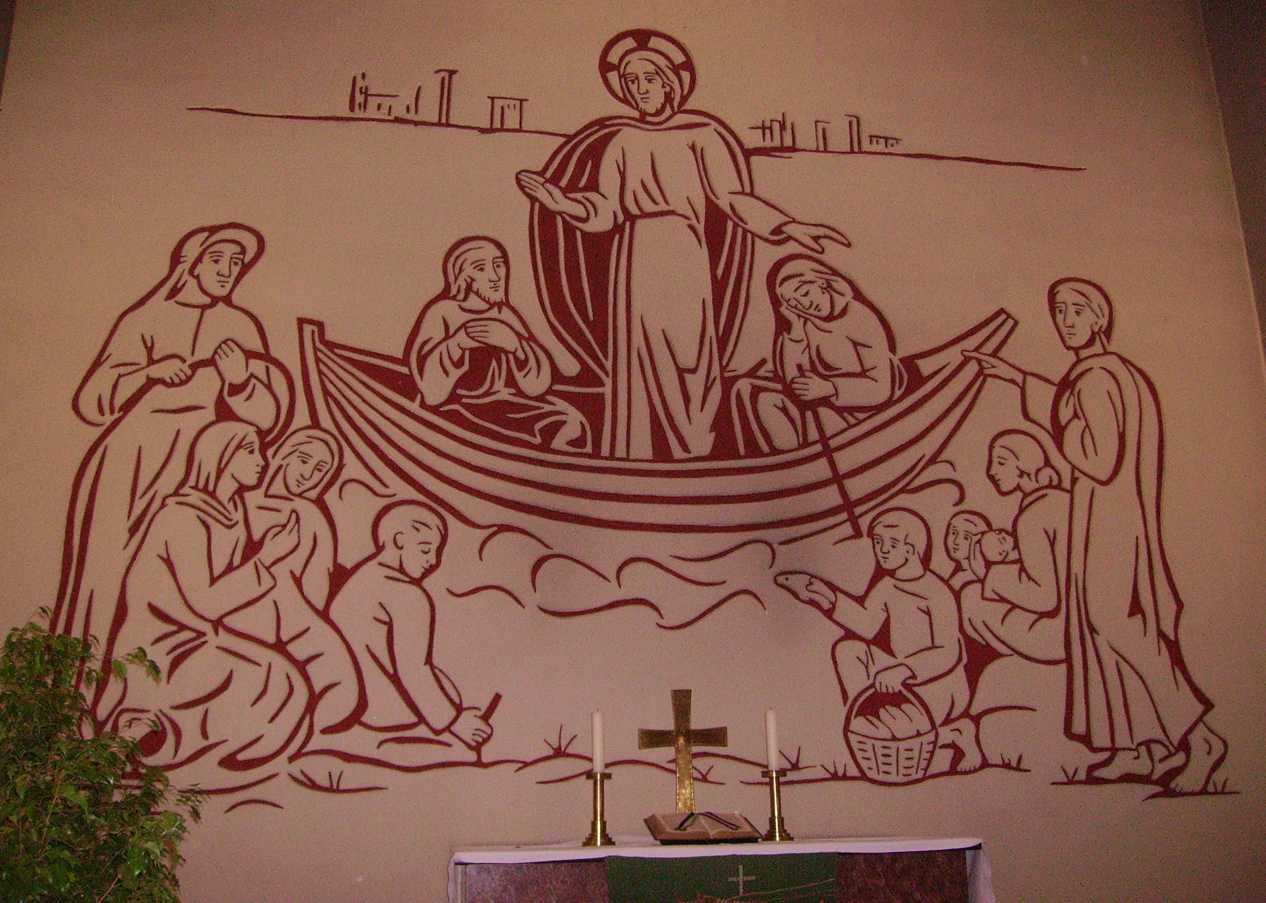 Hafenkirche in Mannheim, Germany